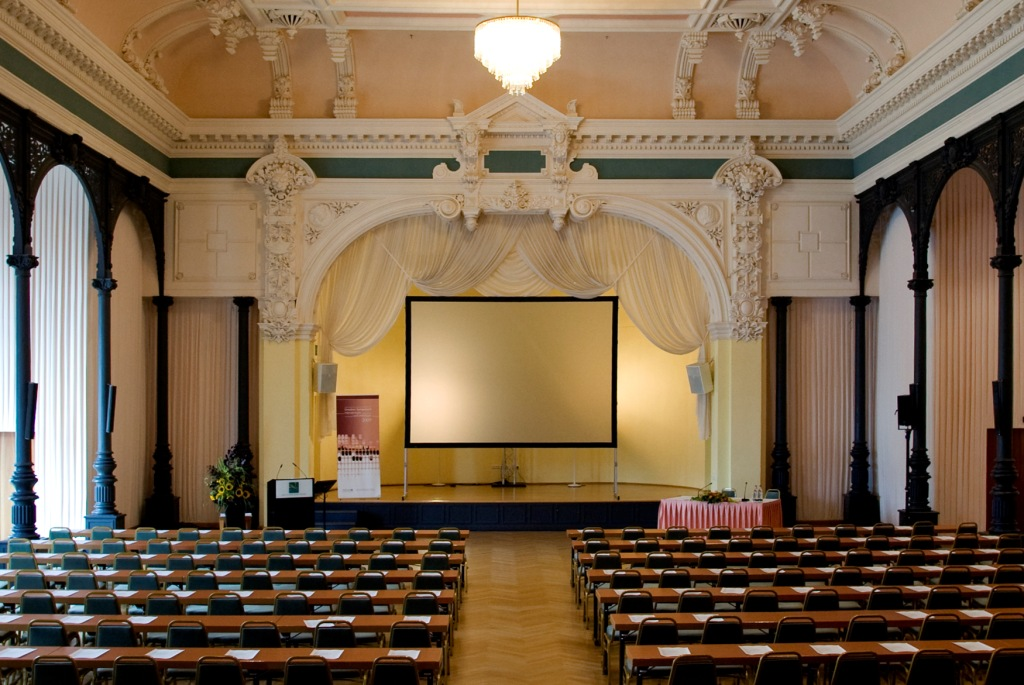 Der Ballsaal Lindengarten als Tagungslocation in parlamentarischer Bestuhlung.